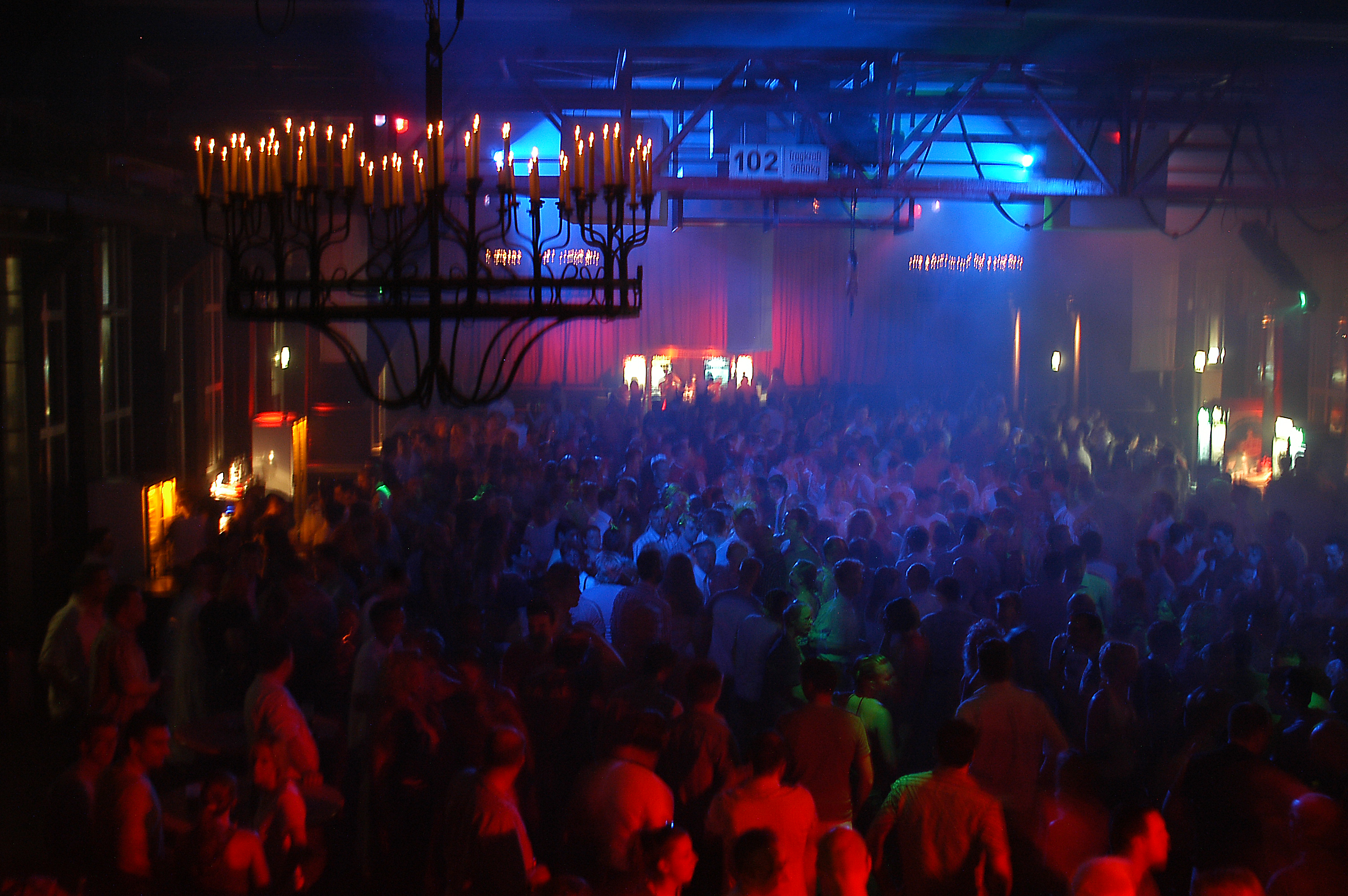 Stahlwerk bei Nacht